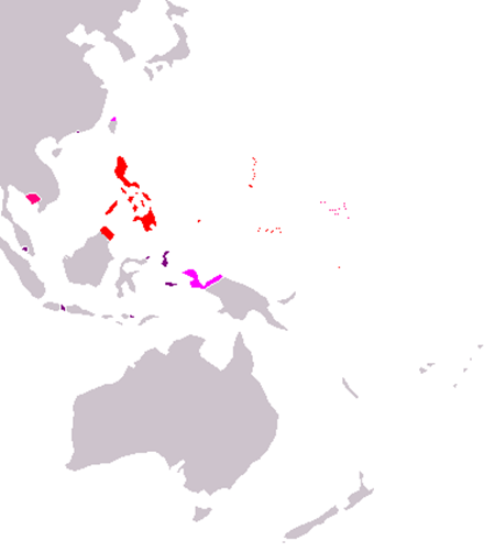 Rojo: imperio Español en Asia y Oceanía. Rosa fuerte: territorios explorados y controlados brevemente. Morado oscuro: territorios de España durante la Unión Ibérica con Portugal. Rosa claro: Territorios perdidos en o después de 1717 por la Paz de Utrecht. El imperio español en Asia y Oceanía comprende todos los territorios colonizados y explorados por los españoles durante varias expediciones de conquista de nuevas tierras en Asia y Pacífico, y su posterior colonización. Este periodo comenzó en 1520, cuando el explorador Fernando de Magallanes tomó posesión de las islas Filipinas en nombre de la corona española y termina en 1898, año en el que España perdió sus ultimas posesiones en Asia durante la guerra hispano-estadounidense y que un año despues, en 1899, vendió todas las islas de Micronesia al imperio alemán. Durante este periodo, se realizaron numerosas expediciones españolas al océano Pacífico donde se descubrieron y exploraron numerosos territorios. Camboya sería controlada completamente por España entre 1597 y 1599. Las islas Marshall son controladas por España por la Capitanía General de Filipinas desde 1570 pero la importancia sobre las islas empezó a verse a partir de 1885.